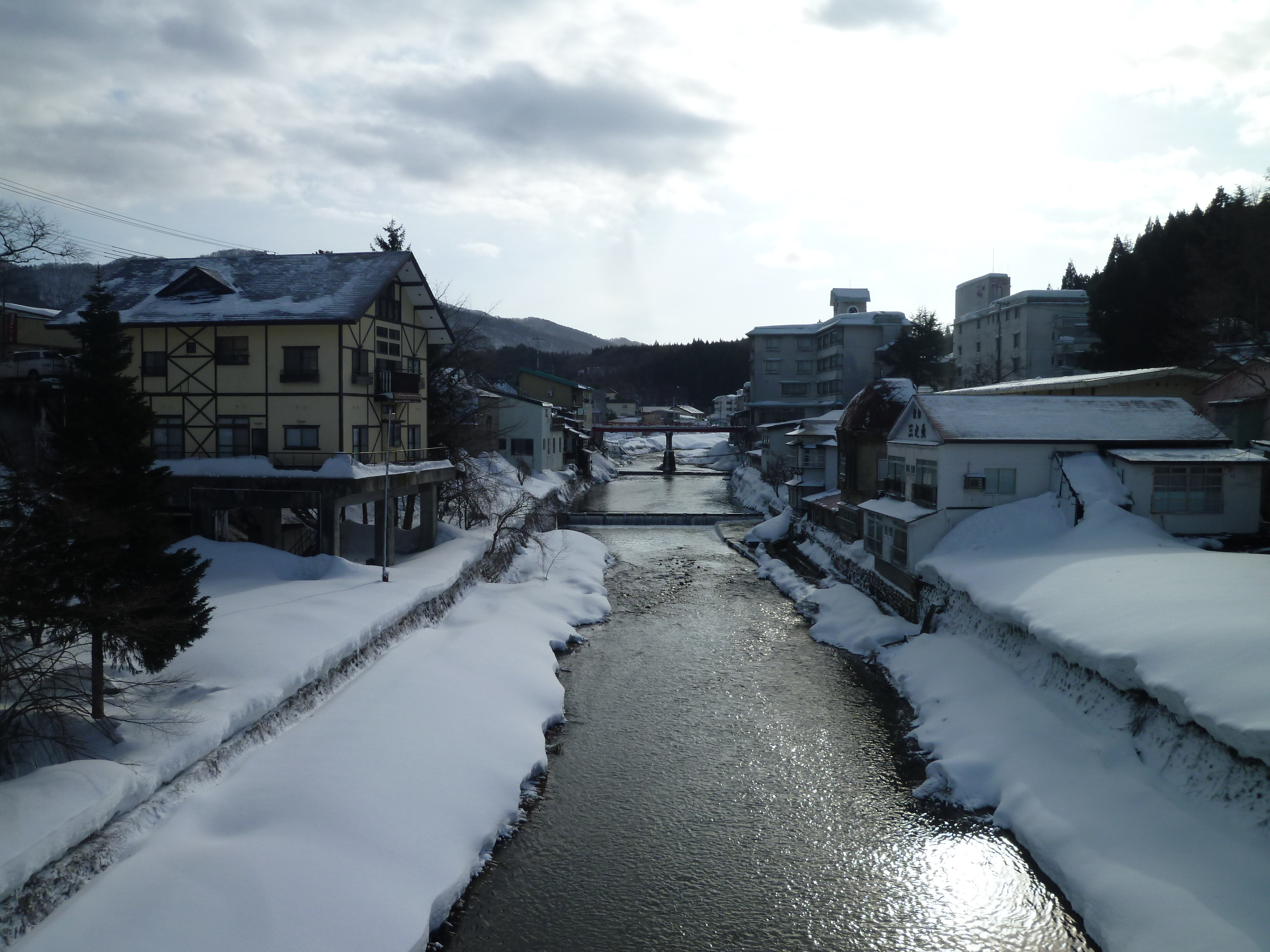 赤倉温泉。山形県最上町。最上小国川を挟んで温泉街が広がる。赤倉橋から上流方向を撮影。